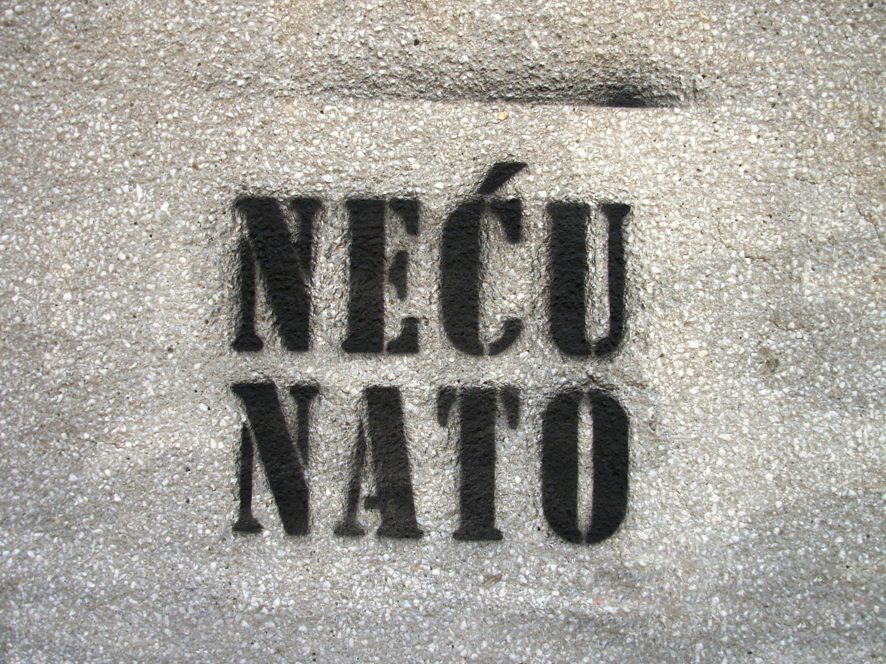 Графит на једном београдском зиду. Сликао Голдфингер